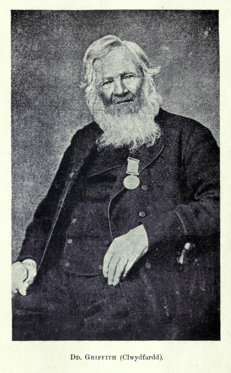 Y bardd a'r Archerwydd Clwydfardd